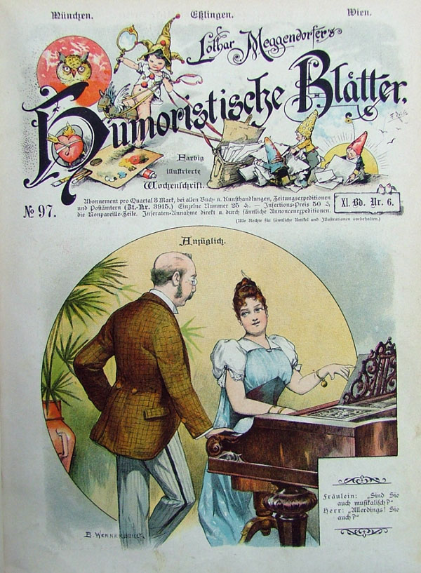 Tittelblatt Humoristische Blätter von Brynolf Wennerberg